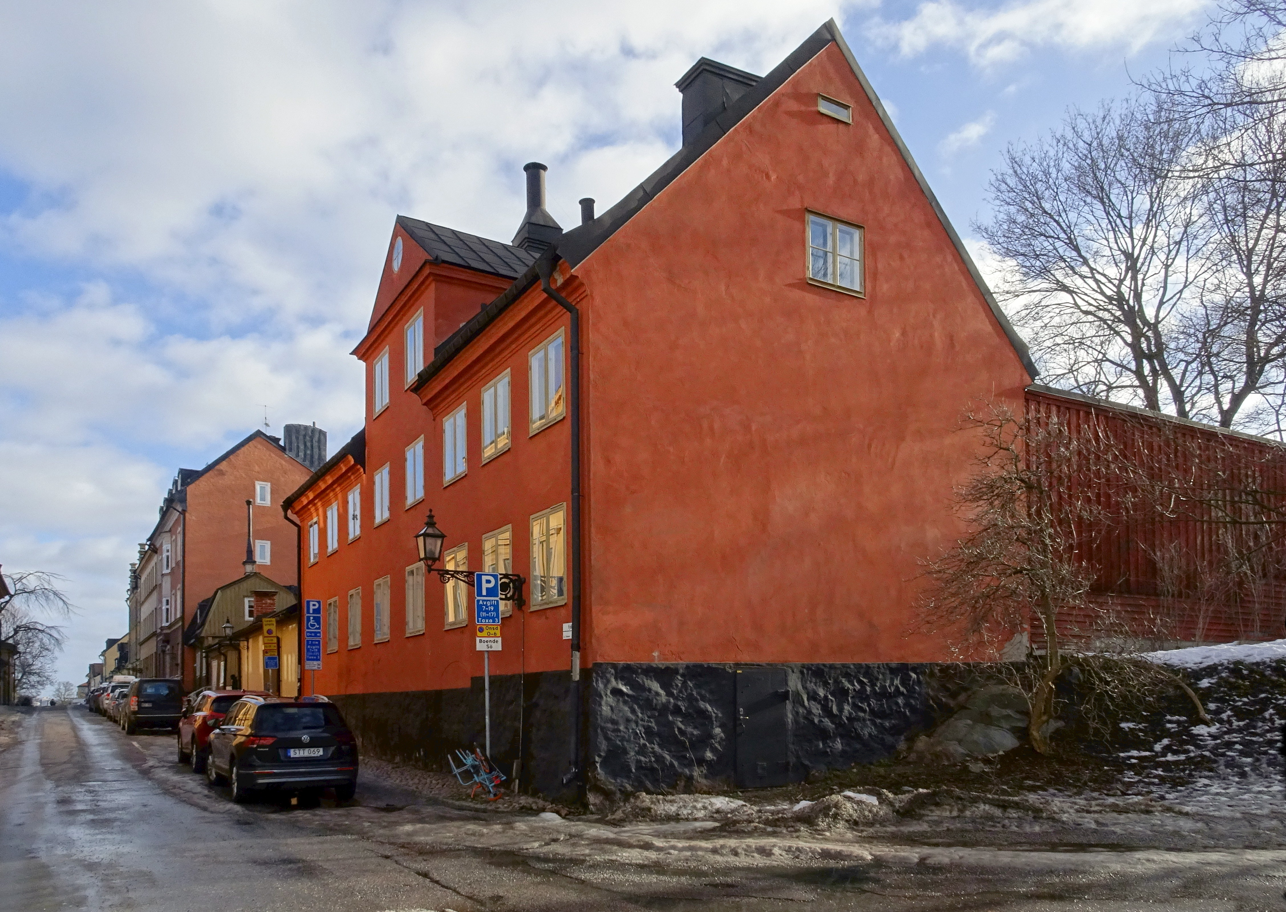 Fjällgatan 16A, 16C, 16E (närmast) västerut